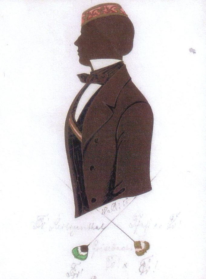 Silhouette von Rudolf Grisebach, Senior des Corps Vandalia Heidelberg, dediziert seinem Corpsbruder August Pfaff (1835-1896) und Franz Heiligenthal (1836?-1897) nach ihrer Paukerei (Mensur) in Peterstal. Heiligenthal war Angehöriger des Corps Suevia Tübingen und war bei Guestphalia Heidelberg Waffenbeleger